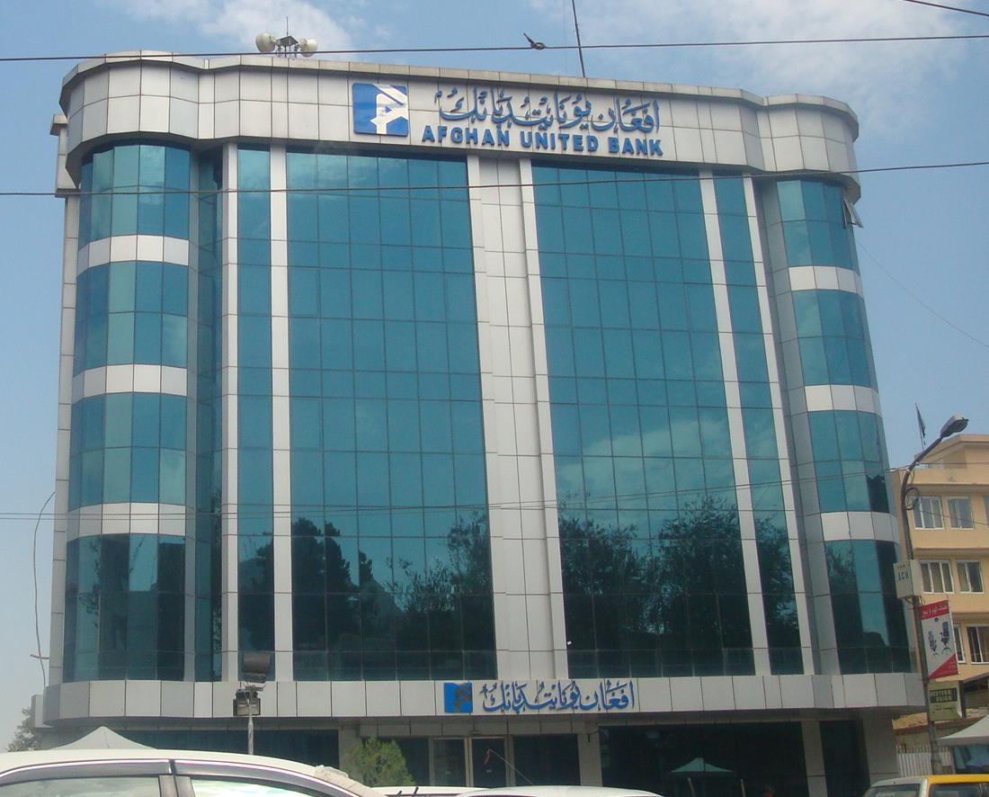 پښتو: د کابل په نوي ښار کې د افغان يونايټېډ بانک ودانۍ